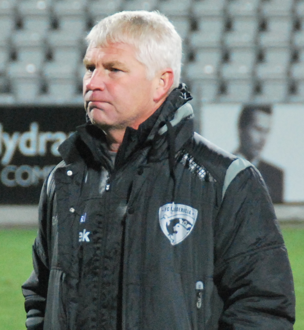 Den tidligere fodboldspiller Steen Thychosen. Her på Viborg Stadion.